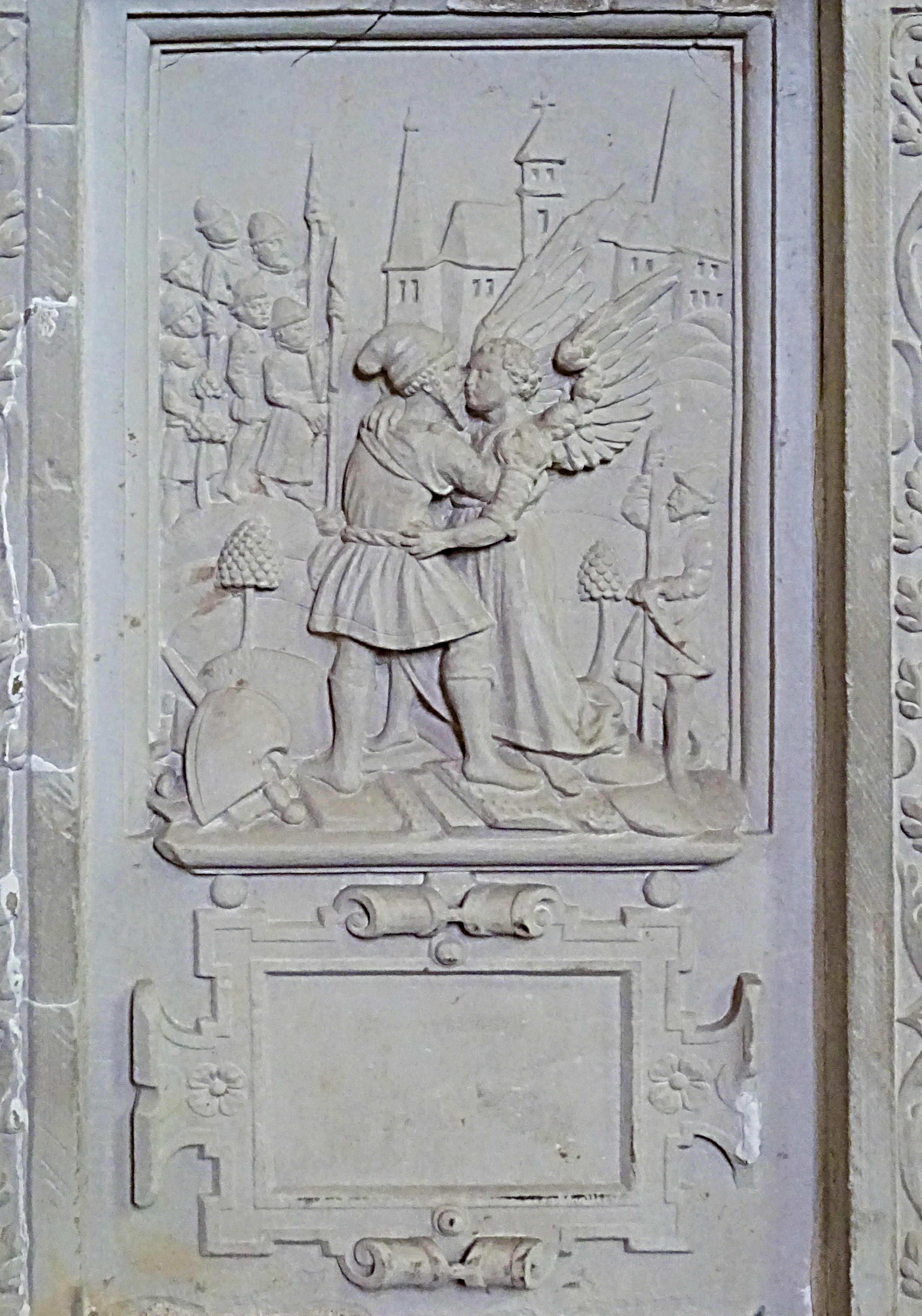 Steinbilderbibel in der St. Annenkirche (Eisleben), 09/29, Jakobs Kampf mit dem Engel